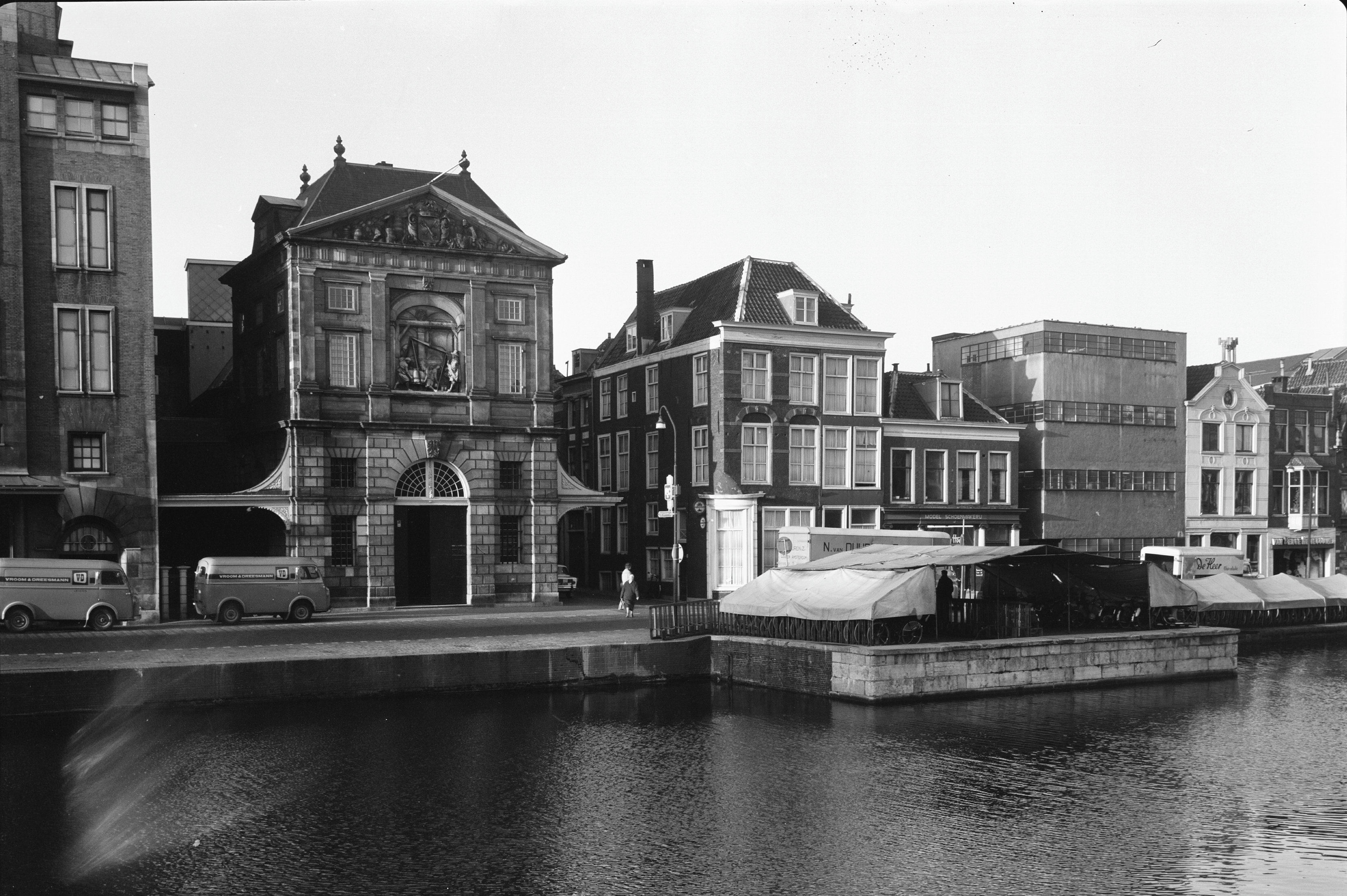 overzicht